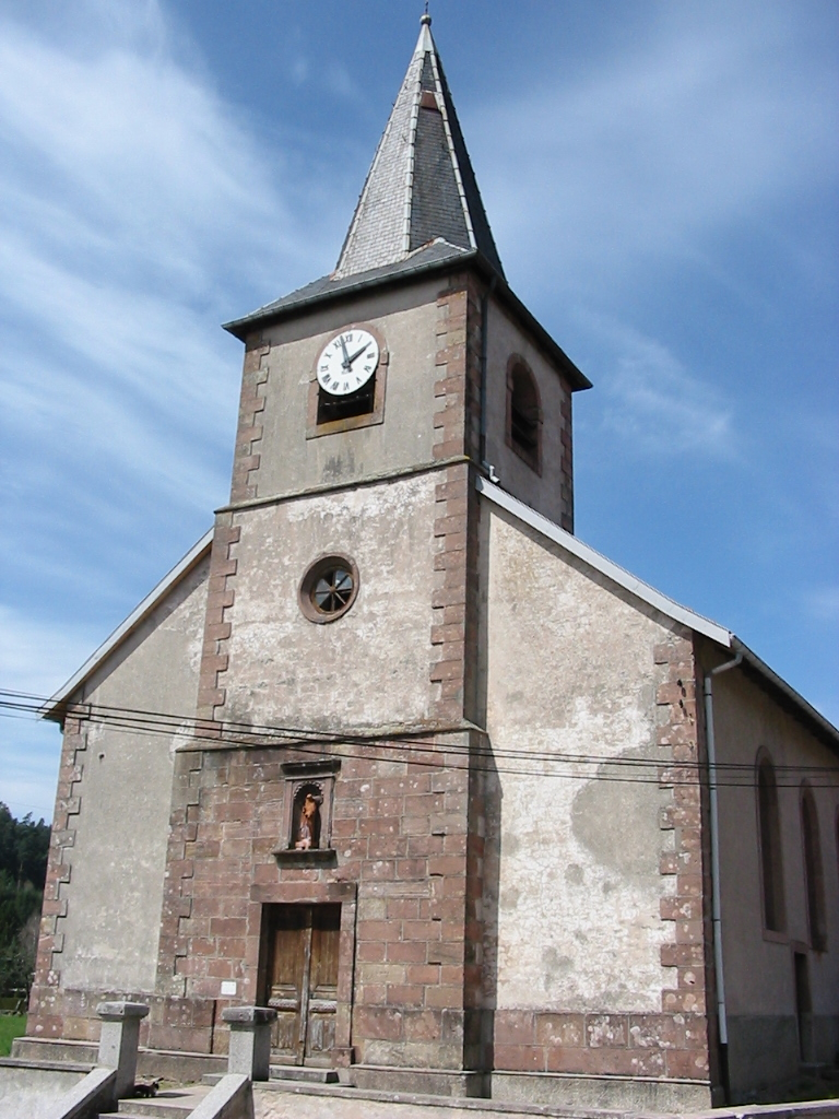 Biffontaine Commune des Vosges L'église Saint-Antoine Photographie personnelle, prise le 23 avril 2006 Copyright © Christian Amet